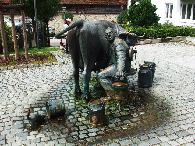 Steuerzahler-Brunnen von Leo Wirth (* 1956 in Bad Mergentheim) in Isny im Allgäu